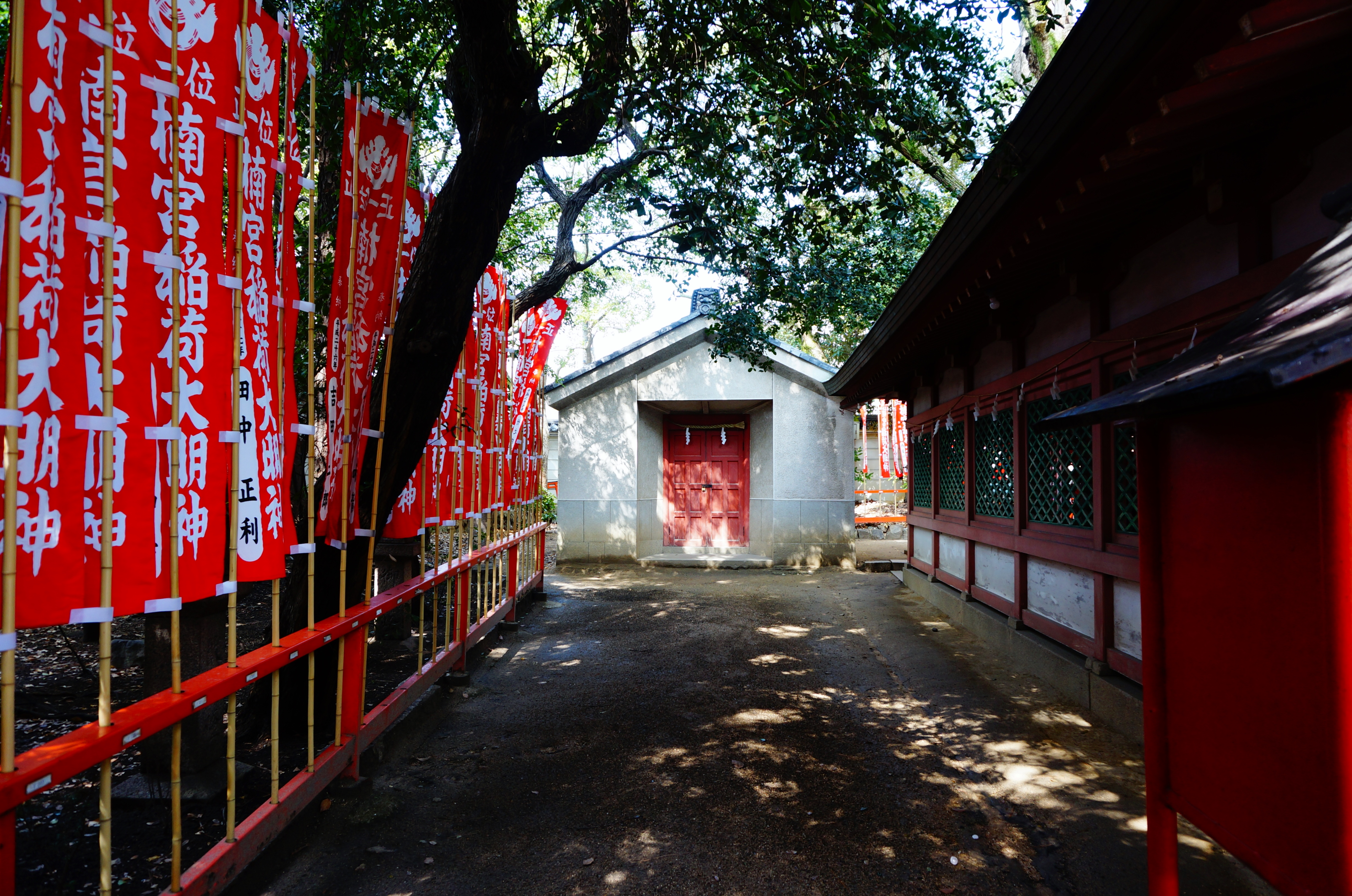 salle des démons